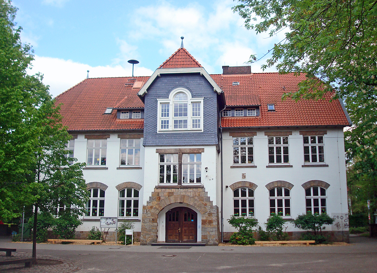 Overbergschule, katholische Bekenntnisschule (Grundschule) in Trägerschaft der Stadt Gütersloh, vom Schulhof aus gesehen This is a photograph of an architectural monument. 134